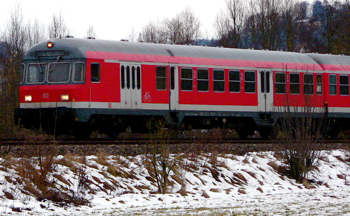 Silberling-Steuerwagen in aktueller Lackierung auf der KBS751 Autor:Michael Meding Quelle:Selbst fotografiert